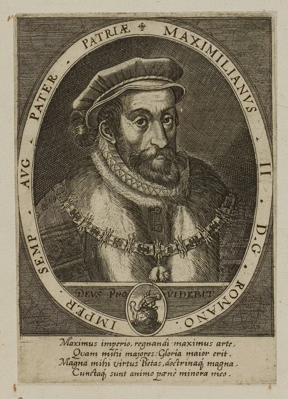 Grafik aus dem Klebeband Nr. 1 der Fürstlich Waldeckschen Hofbibliothek Arolsen Motiv: Kaiser Maximilian II.